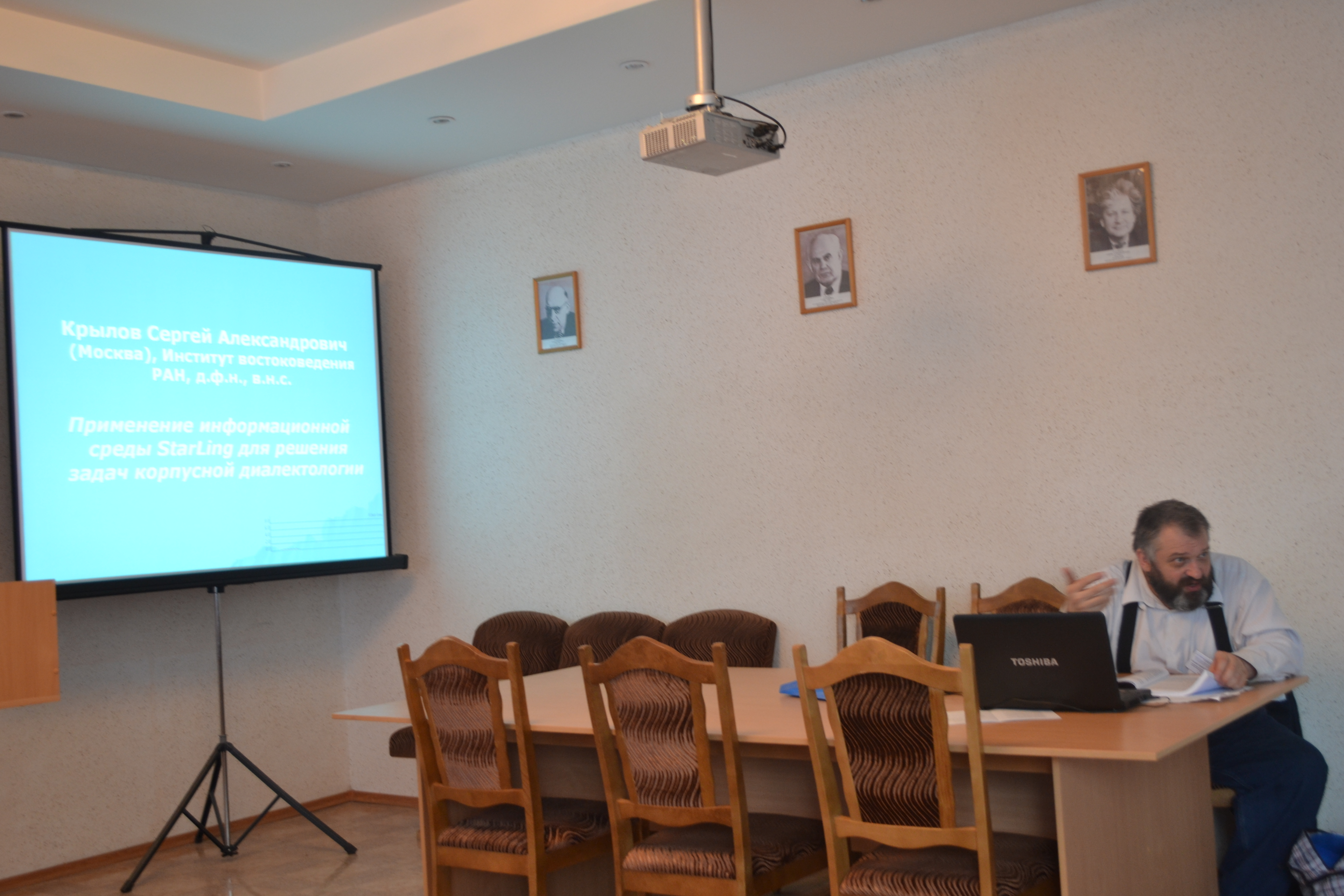 Крылов Сергей Александрович – Ведущий научный сотрудник Института востоковедения РАН (Отдел языков Азии и Африки) (работает в Институте с апреля 1984 года), главный научный сотрудник Института системного анализа РАН (с марта 2007), профессор Государственного Университета Природы, общества и человека «Дубна» (с сентября 2005), заведующий кафедрой общего и славянского языкознания Российского православного института Святого Иоанна Богослова (с июля 2004 по июнь 2009). Выступление на одной из секций на XIII Международной конференции «Актуальные проблемы диалектологии языков народов России», ИИЯЛ, Уфа